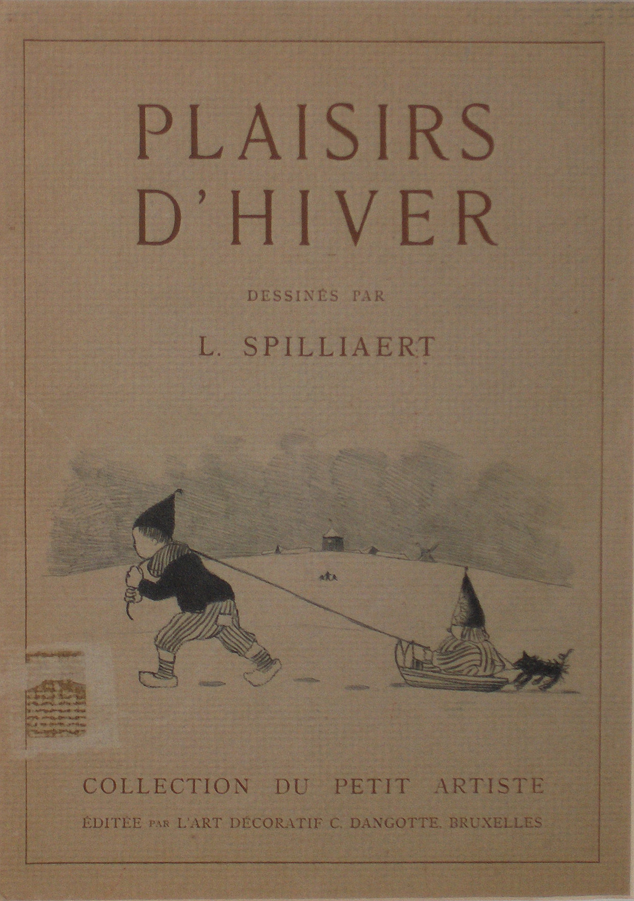 Omslag van "Les plaisirs d'hiver" meerkleurendruk in de reeks "Collection du Petit Artiste" door de Belgische kunstenaar Léon Spilliaert; collectie Mu.ZEE, Oostende